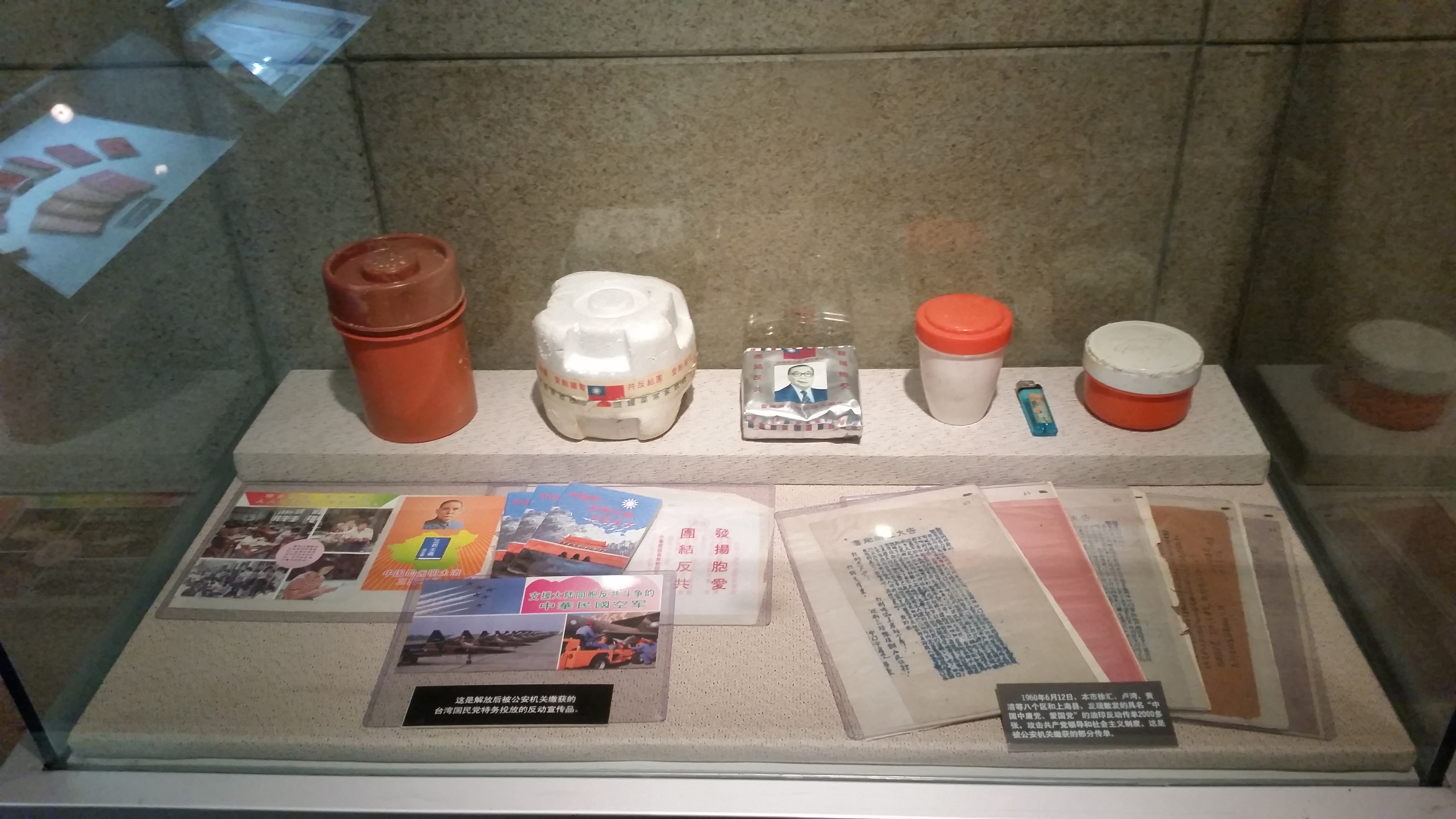 中文（中国大陆）: 上海公安博物馆馆藏——“台湾国民党特务投放的反动宣传品”